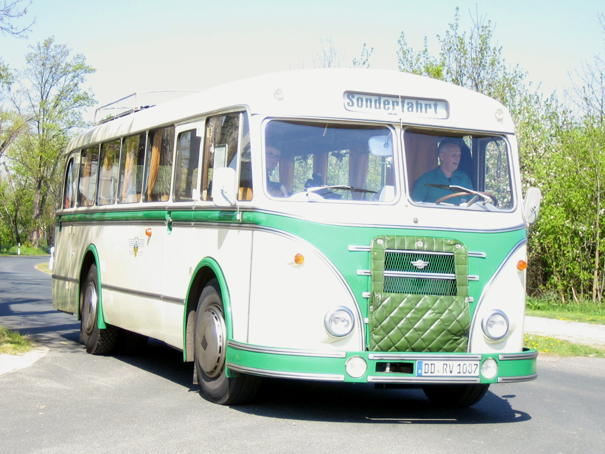 Alter Omnibus vom Typ H6 B/L aus dem VEB Kraftfahrzeugwerk „Ernst Grube“ Werdau (DDR) des Kraftverkehr Dresden.